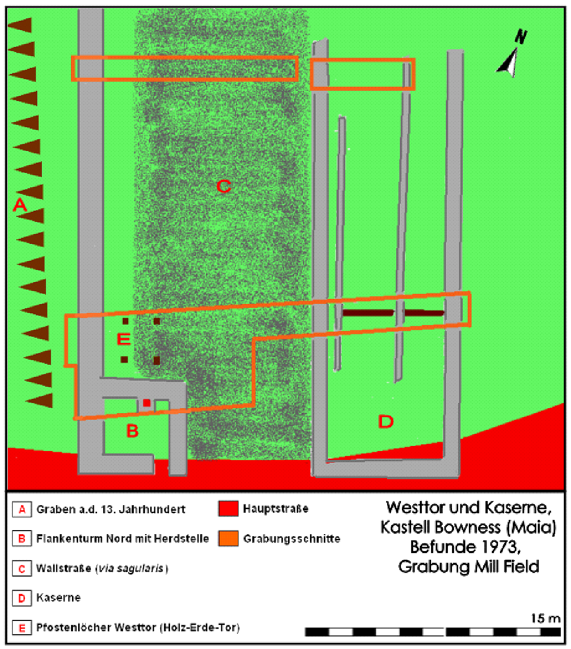 Befundskizze Grabung Bowness on Solway/Mill Field, 1973, Westtor und Kaserne des Kastell Maia (Hadrianswall).